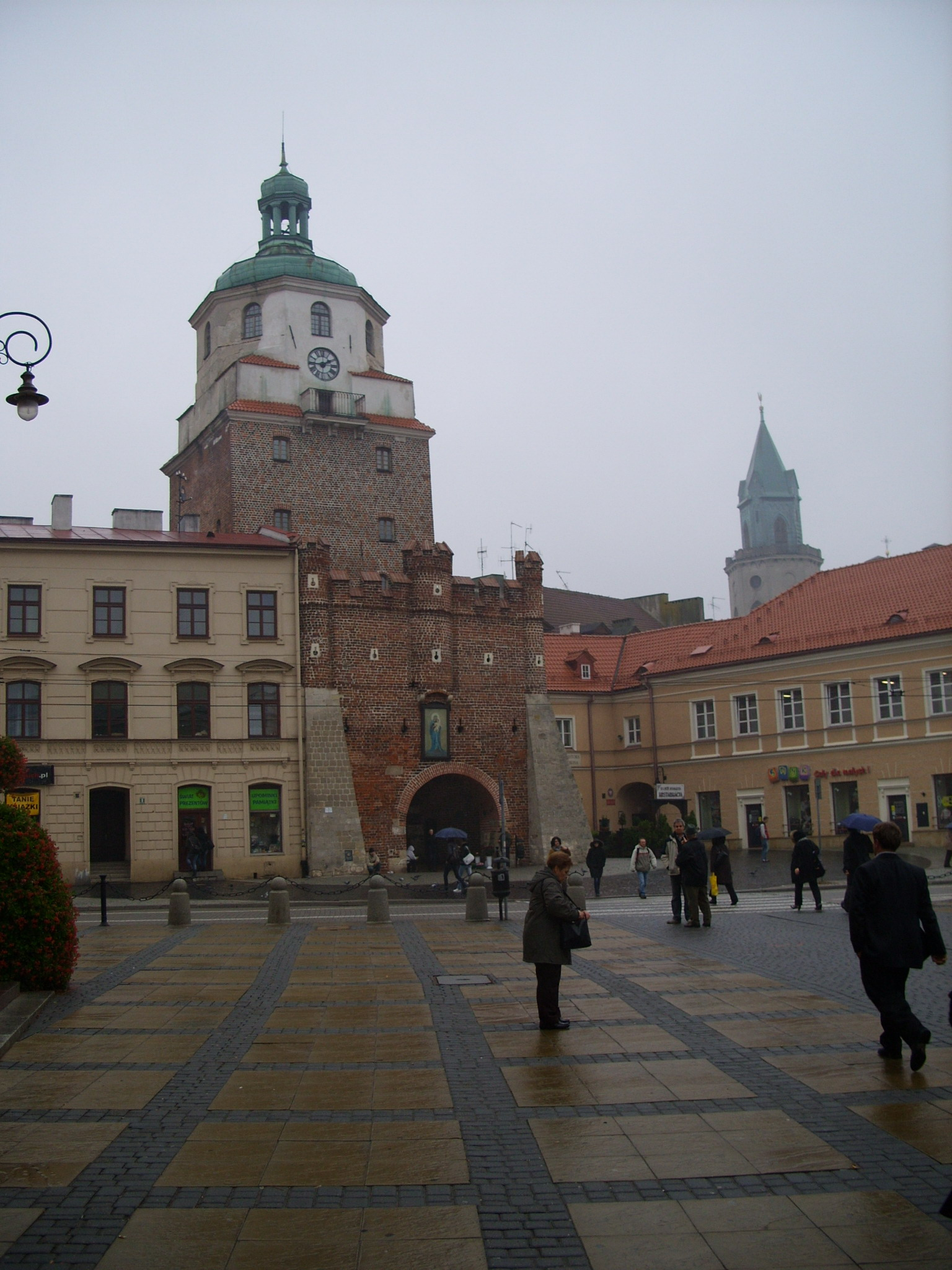 A 14. században épült Krakkói Kapu (Brama Krakowska) Lublinban (Lengyelország)